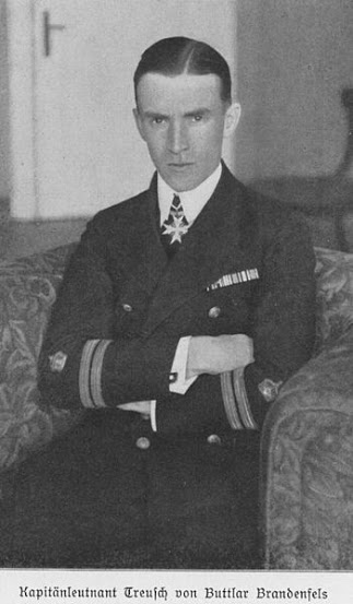 Kapitänleutnant Treusch von Buttlar Brandenfels